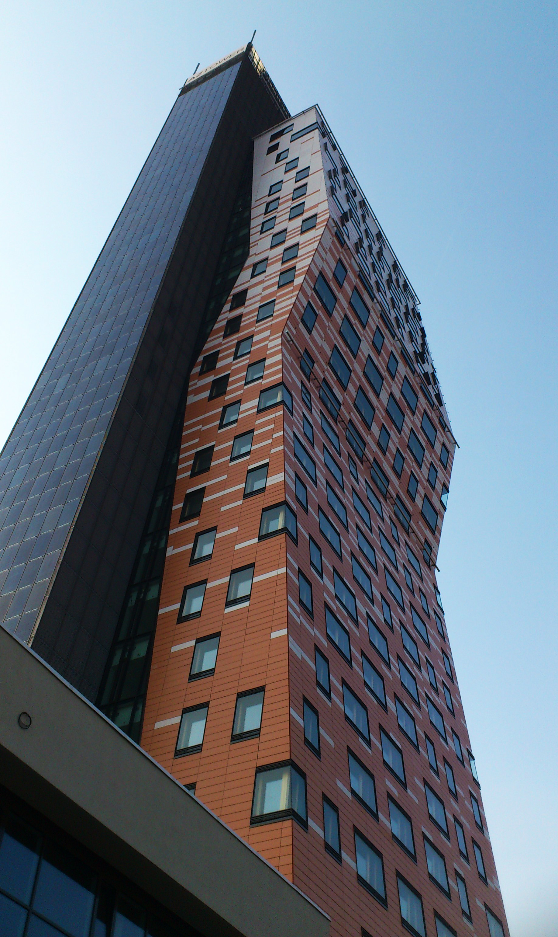 Mrakodrap AZ Tower, Pražákova, Brno